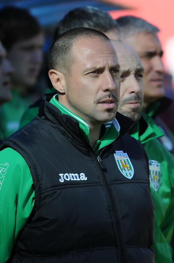 Игор Йовичевич